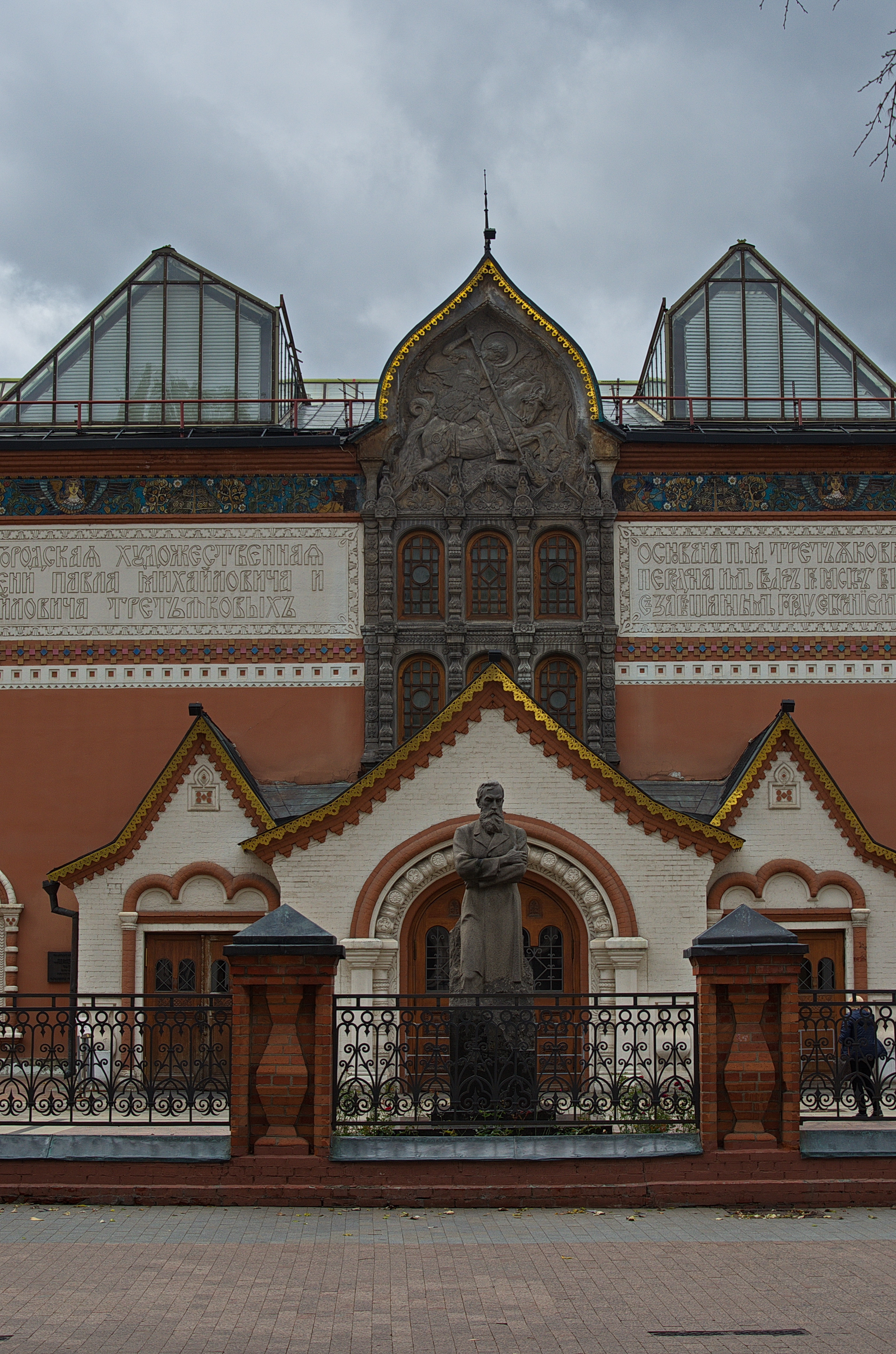 0943 - Moskau 2015 - Tretjakow Galerie